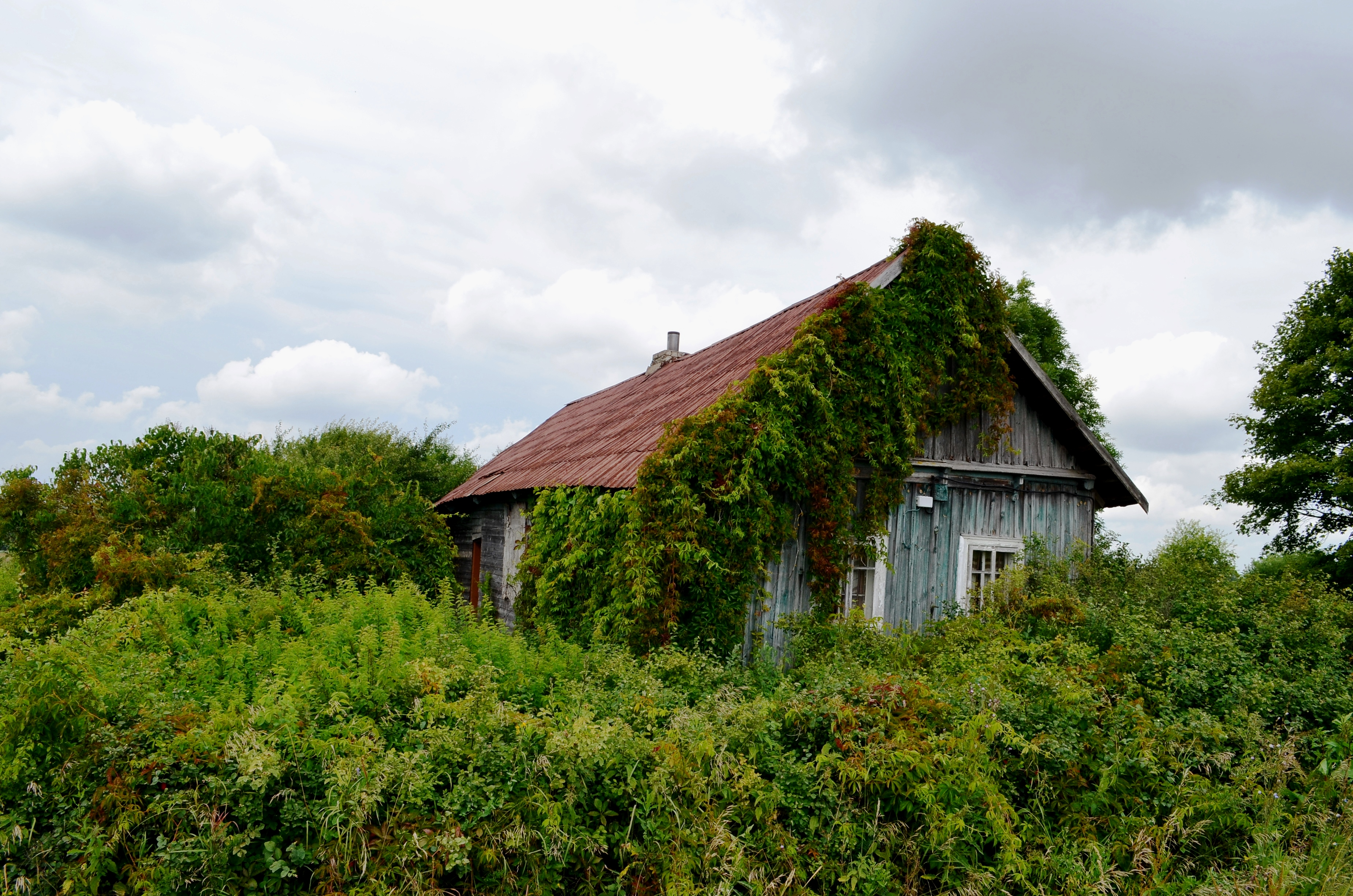 Sena gryčia, Jasiuliškiai, Molėtų r.